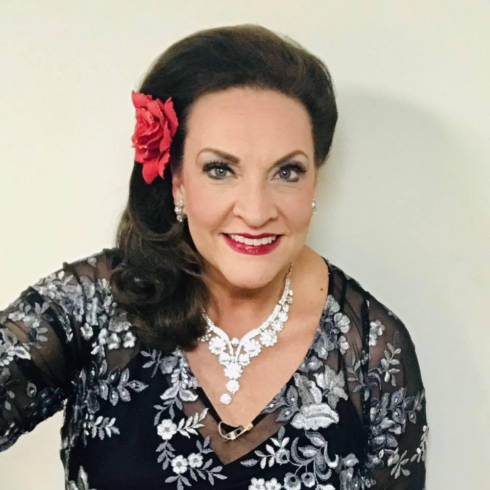 Victoria Livengood, Mezzo Soprano